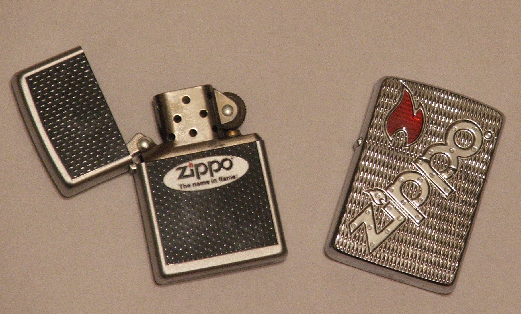 2 brichete din colecția proprie